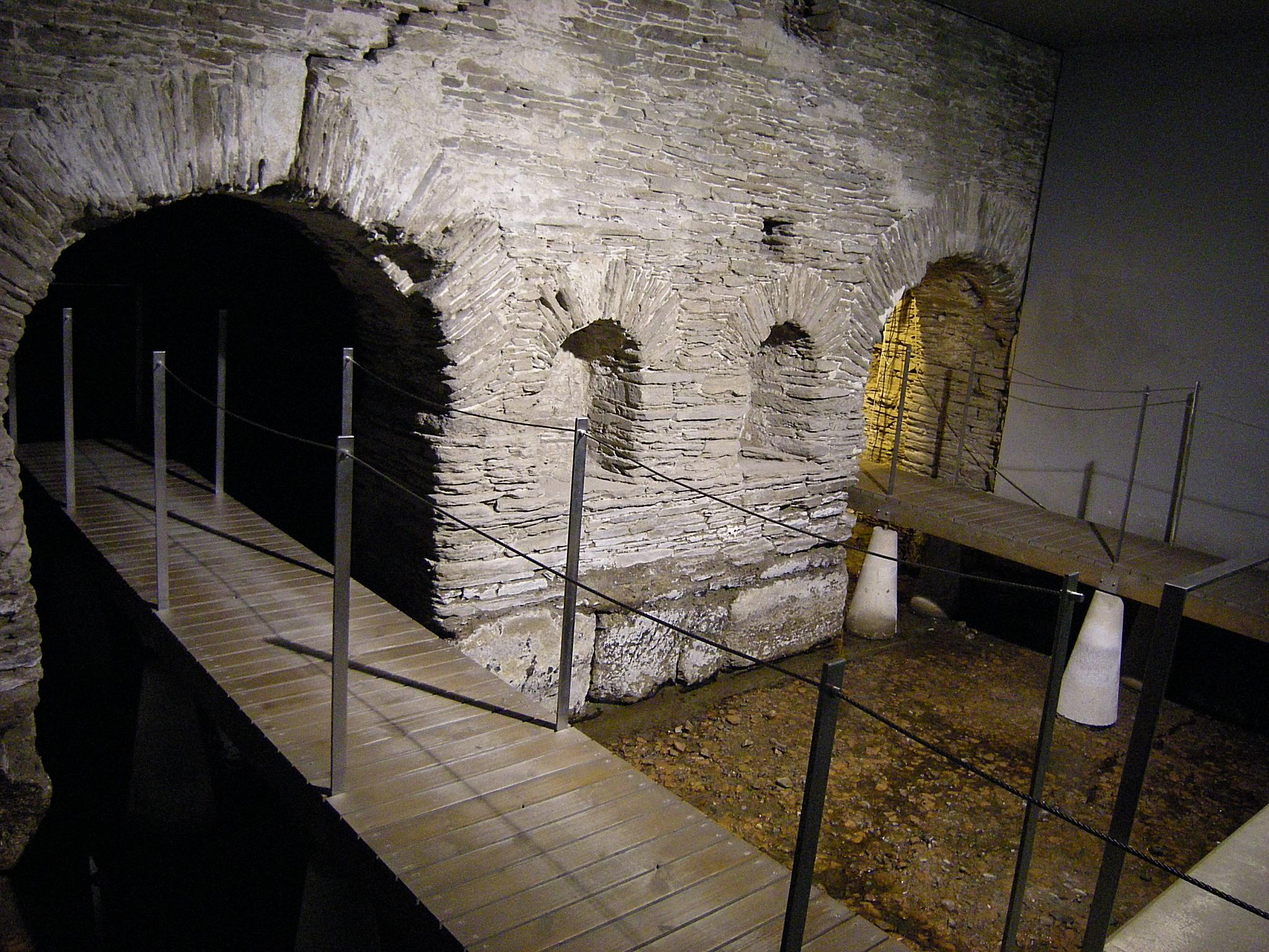 Termas romanas de Lugo